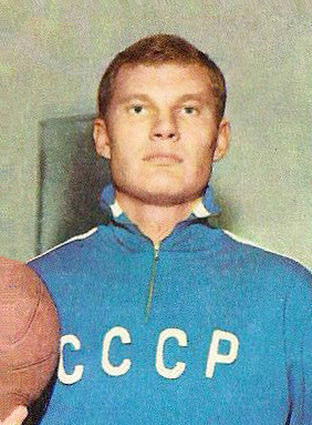 CAMPIONI DELLO SPORT PANINI 1970 1971 248 MOSETS PAULAUSKAS PALLACANESTRO